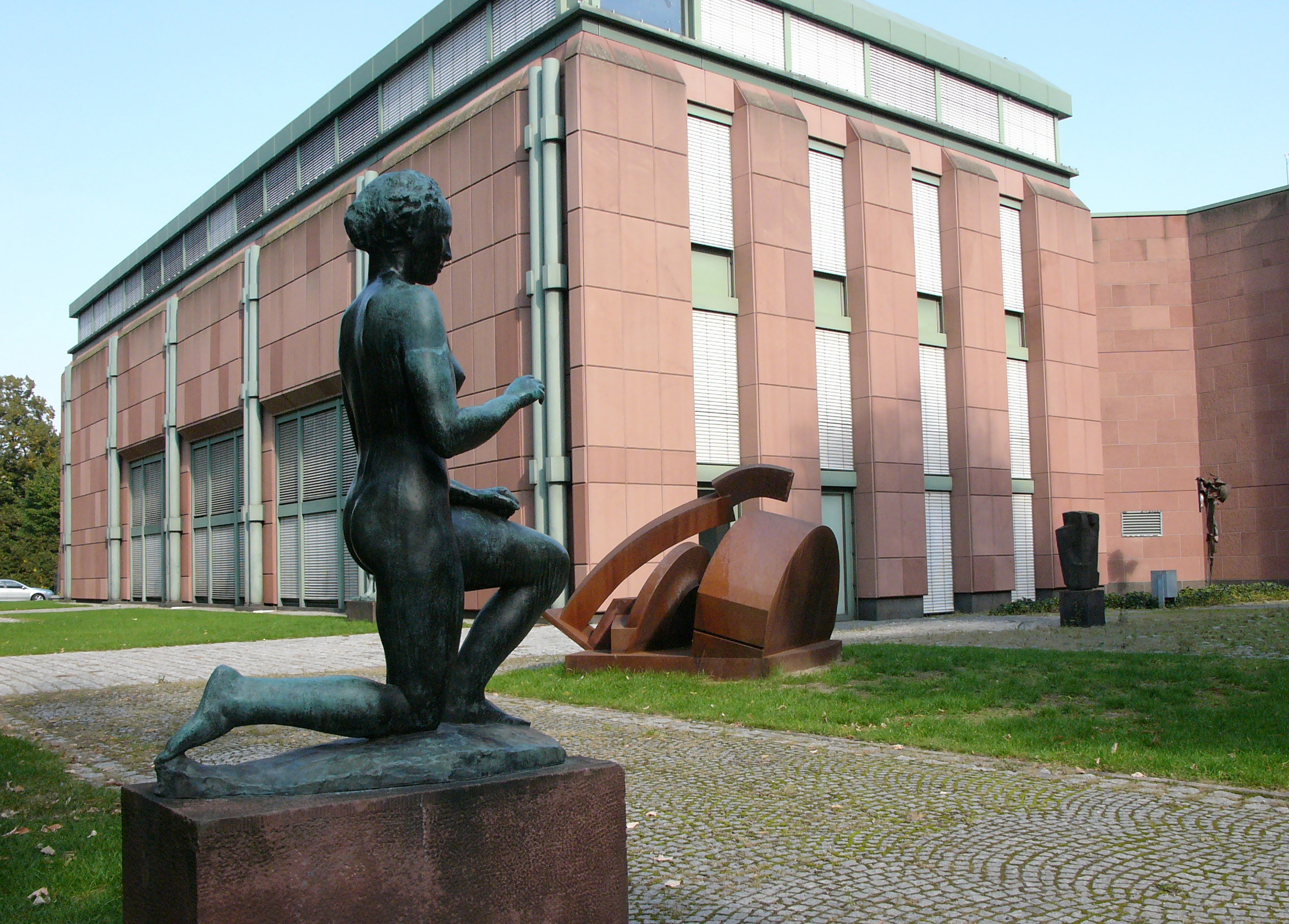 Mannheim, Kunsthalle, Skultpurengarten, im Vordergrund die Skulptur „Die Morgenröte“ von Richard Scheibe, Bronze, 1937